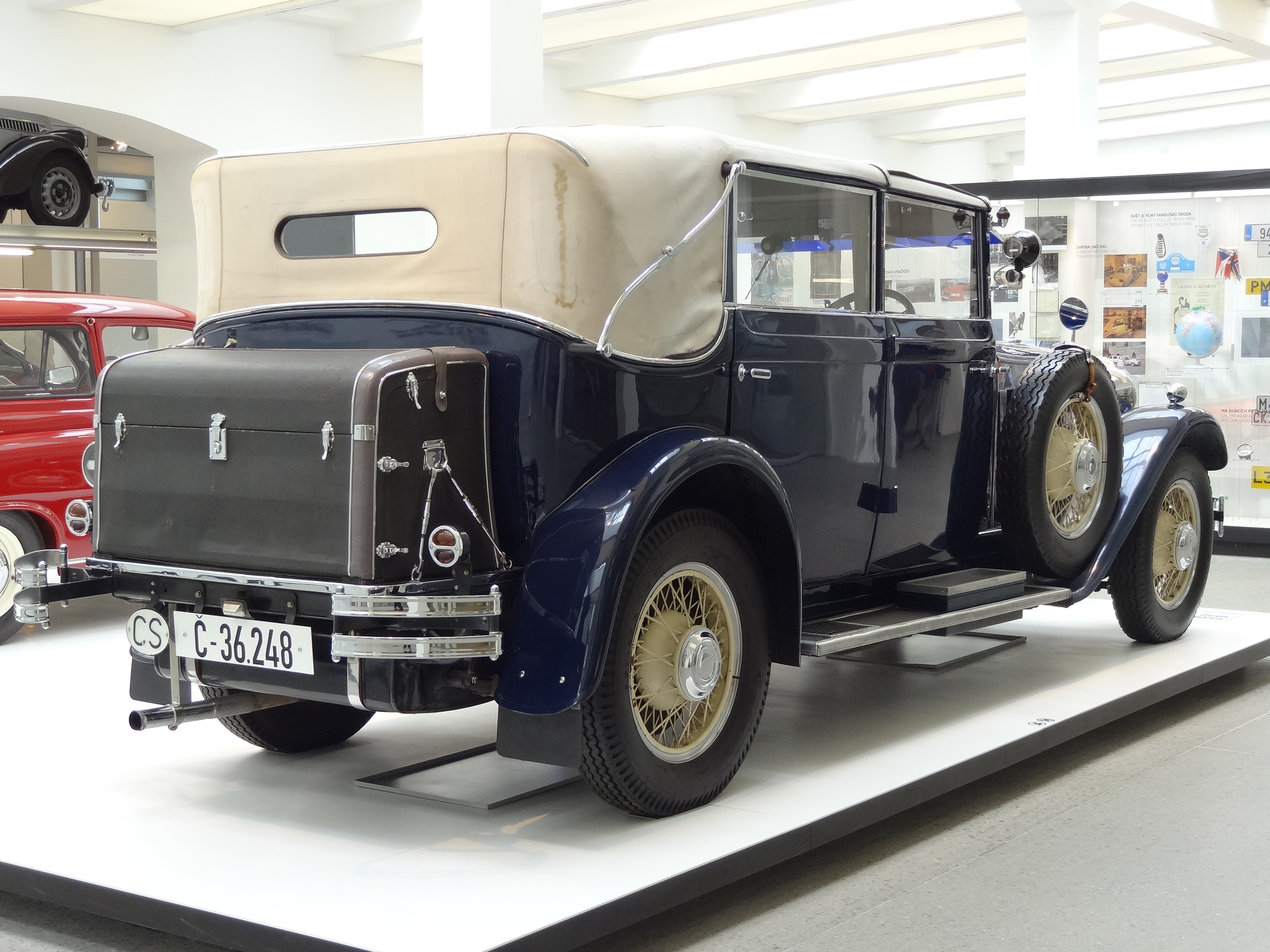 years of production: 1929-1933, cylinders: 8, displacement: 3880 ccm, output: 44,1kw (60hp), gearbox: 4+R, max speed 110 km/h "Skodas Serien-Achtzylinder: Der prachtvolle TYP 860 wird nur 49 Mal gebaut, davon viermal als Cabriolet. Die vordere Sitzbank ist aus strapezierfähigem Leder - das weist ihn als Chauffeurswagen für exklusive Kundschaft aus. Eine Limousine bekommt der tschechoslowakische Premierminister." (Hinweistafel)